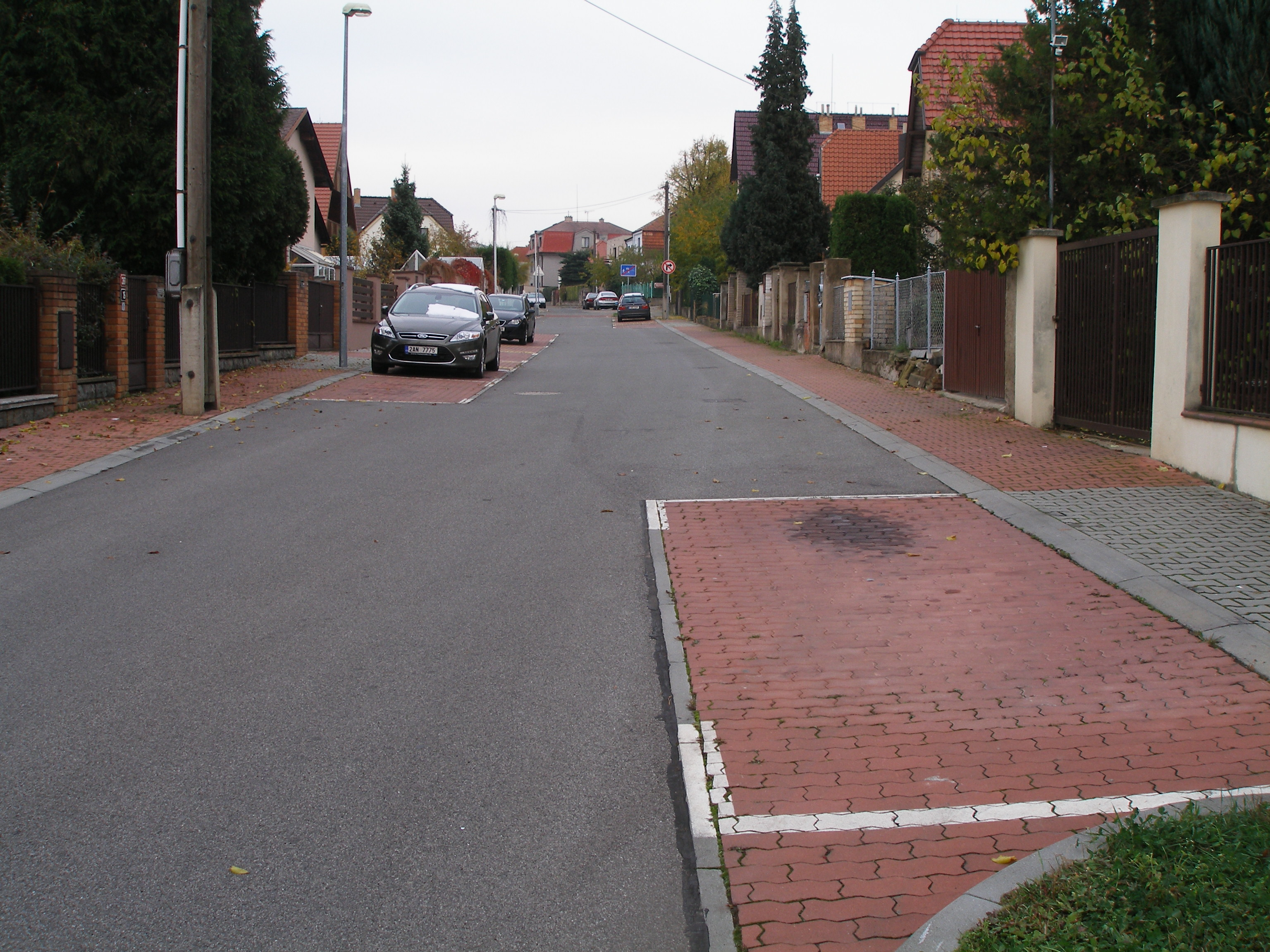 Dopravní šikany v pražské ulici Nad Ražákem.